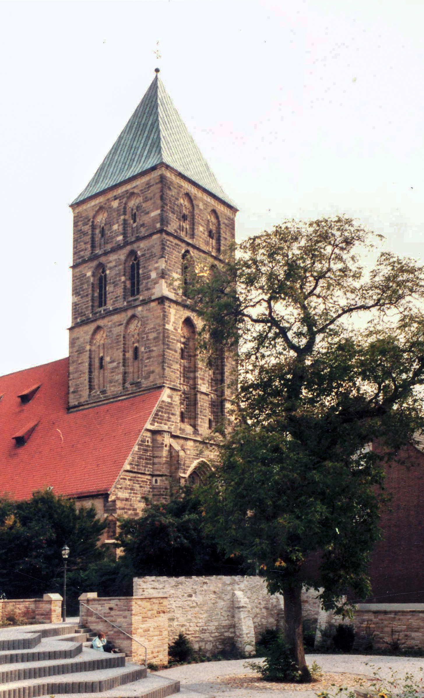 Kirchburg und Stadtmauer, St. Dionysius Rheine